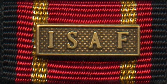 Bandschnalle Einsatzmedaille der Bundeswehr ISAF